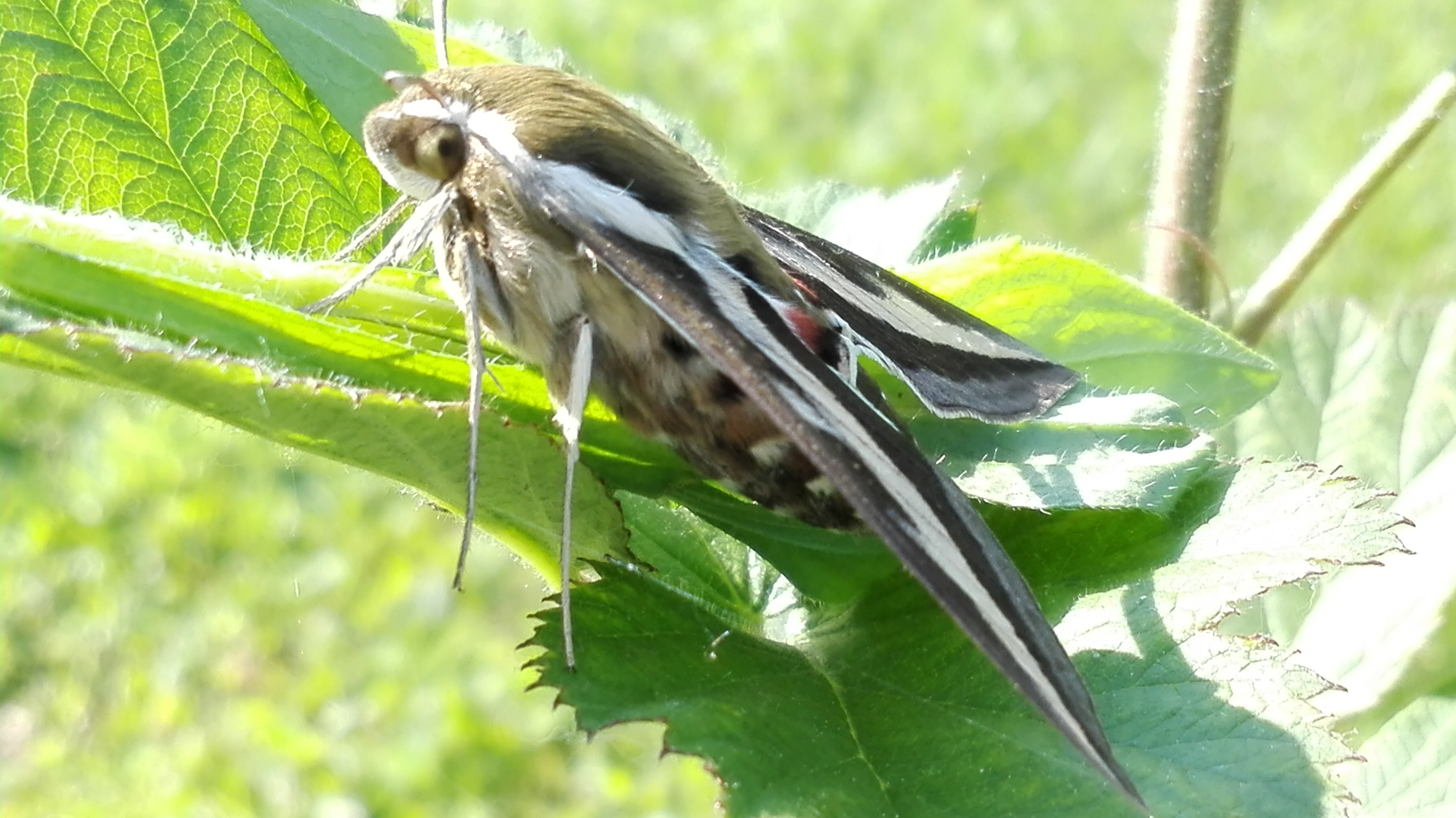 Hyles gallii